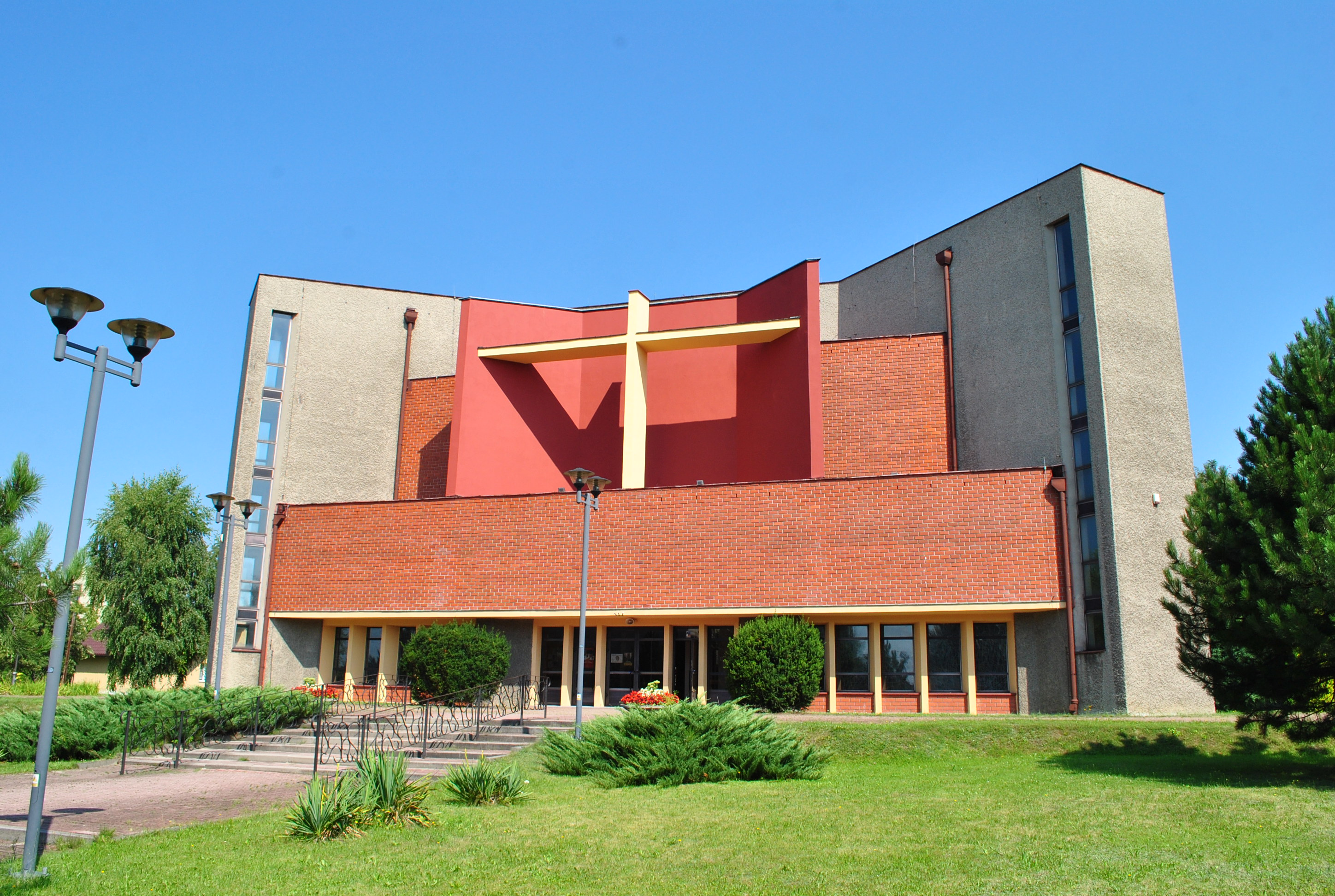 Katowice - Brynów. Kościół parafialny Parafii Świętej Rodziny w Katowicach